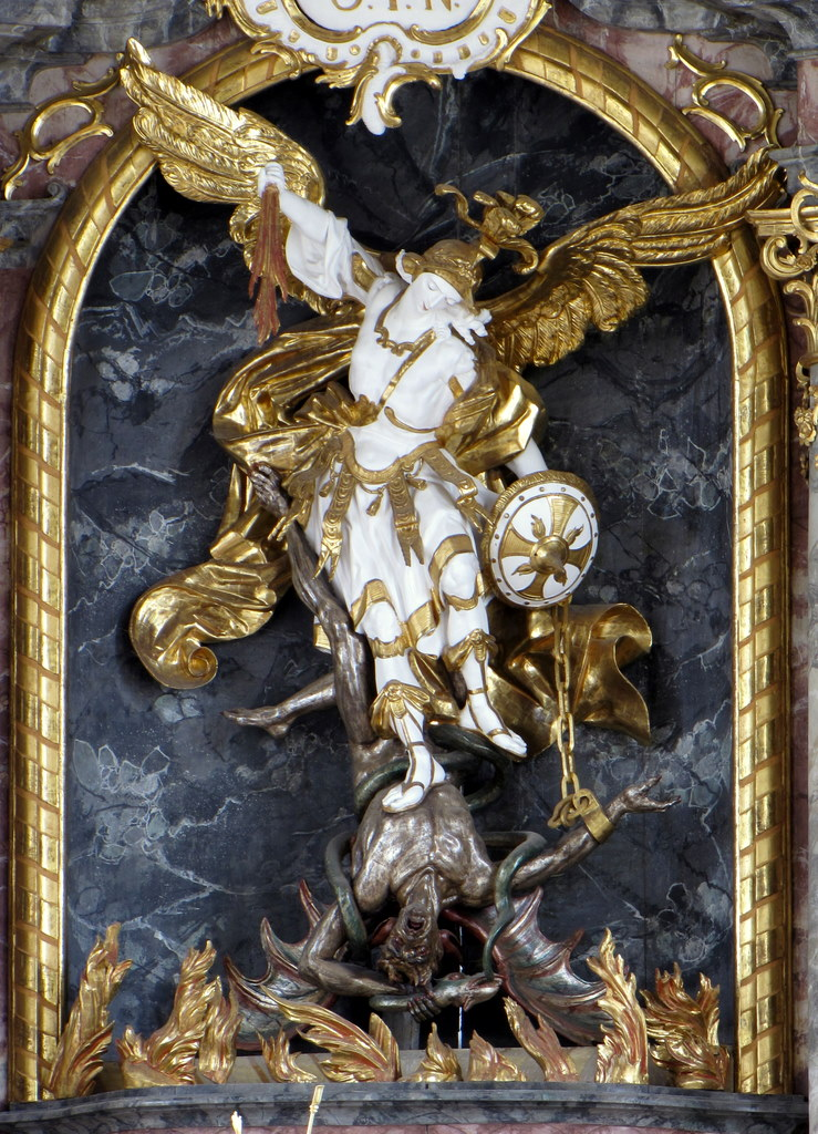 Figurengruppe von Luzifers Sturz im Hochaltar der Pfarrkirche Denklingen